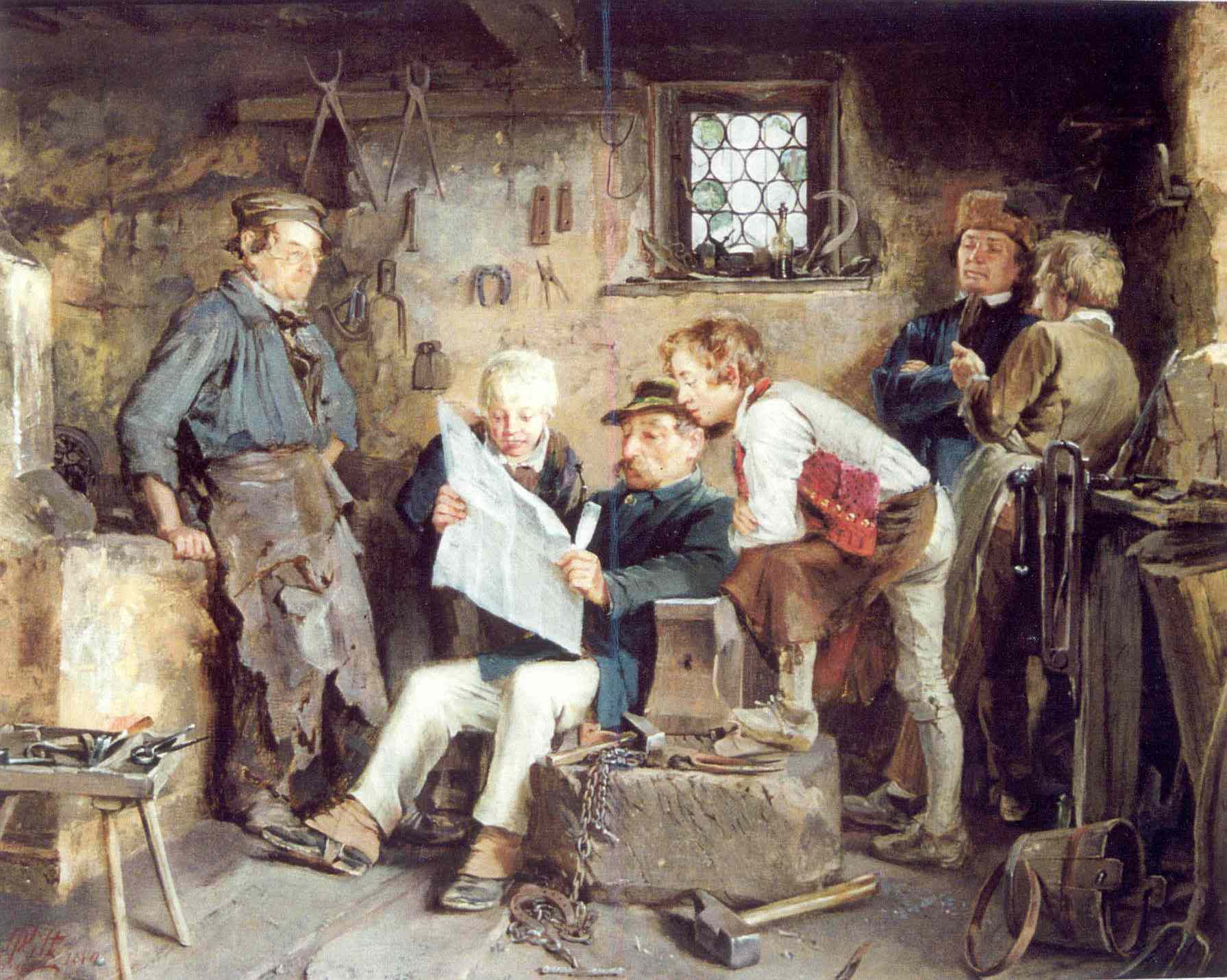 Bauer in der Schmiede beim Zeitunglesen. Zwei Knaben blicken ihm über die Schulter, zwei ältere Leute besprechen den Gegenstand. Links der Schmied bei seinem Herde.